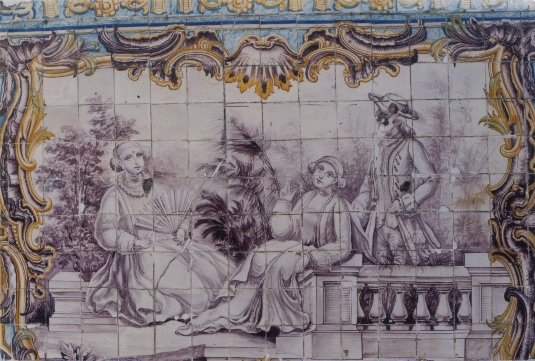 Painel de azulejos no Palácio Nacional de Queluz, Portugal.